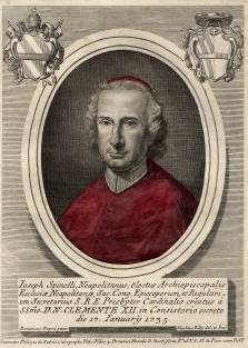 Cardinal Giuseppe Spinelli